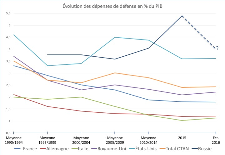 Graphique montrant l'évolution des dépenses de défense de l'OTAN et de la Russie depuis la fin de la guerre froide (données publiées par l'OTAN pour les pays membres et par le SIPRI pour la Russie)